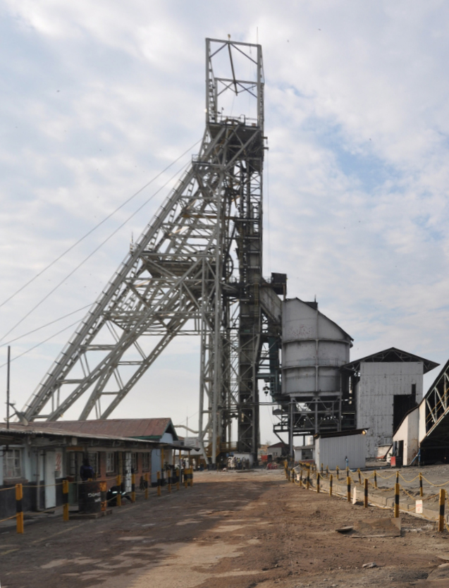 Mopani Mine in Zambia